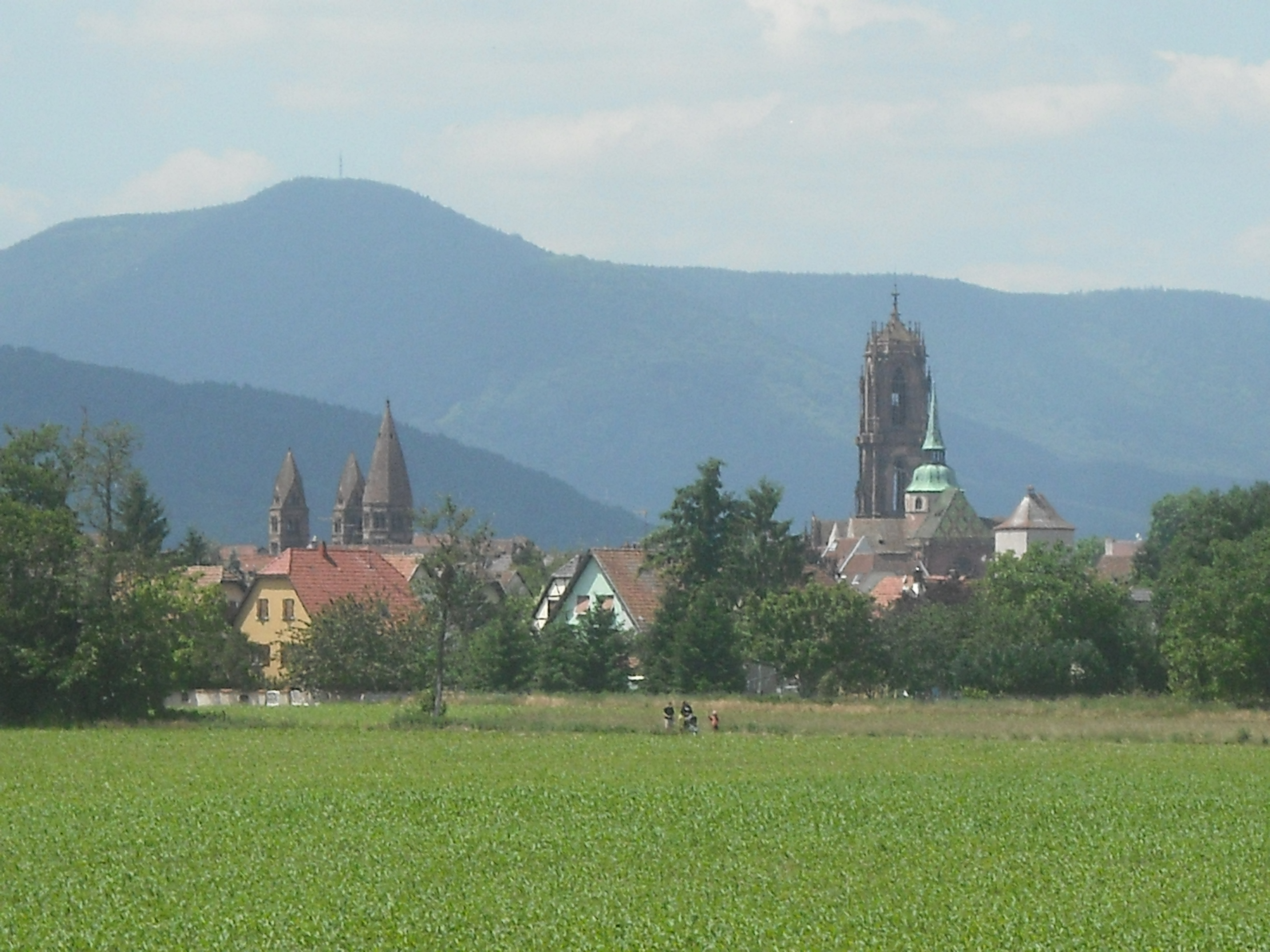 Panorama de Sélestat, France.